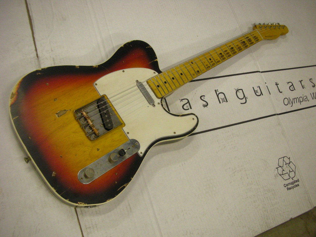 Guitarra modelo Telecaster de Nash Guitars